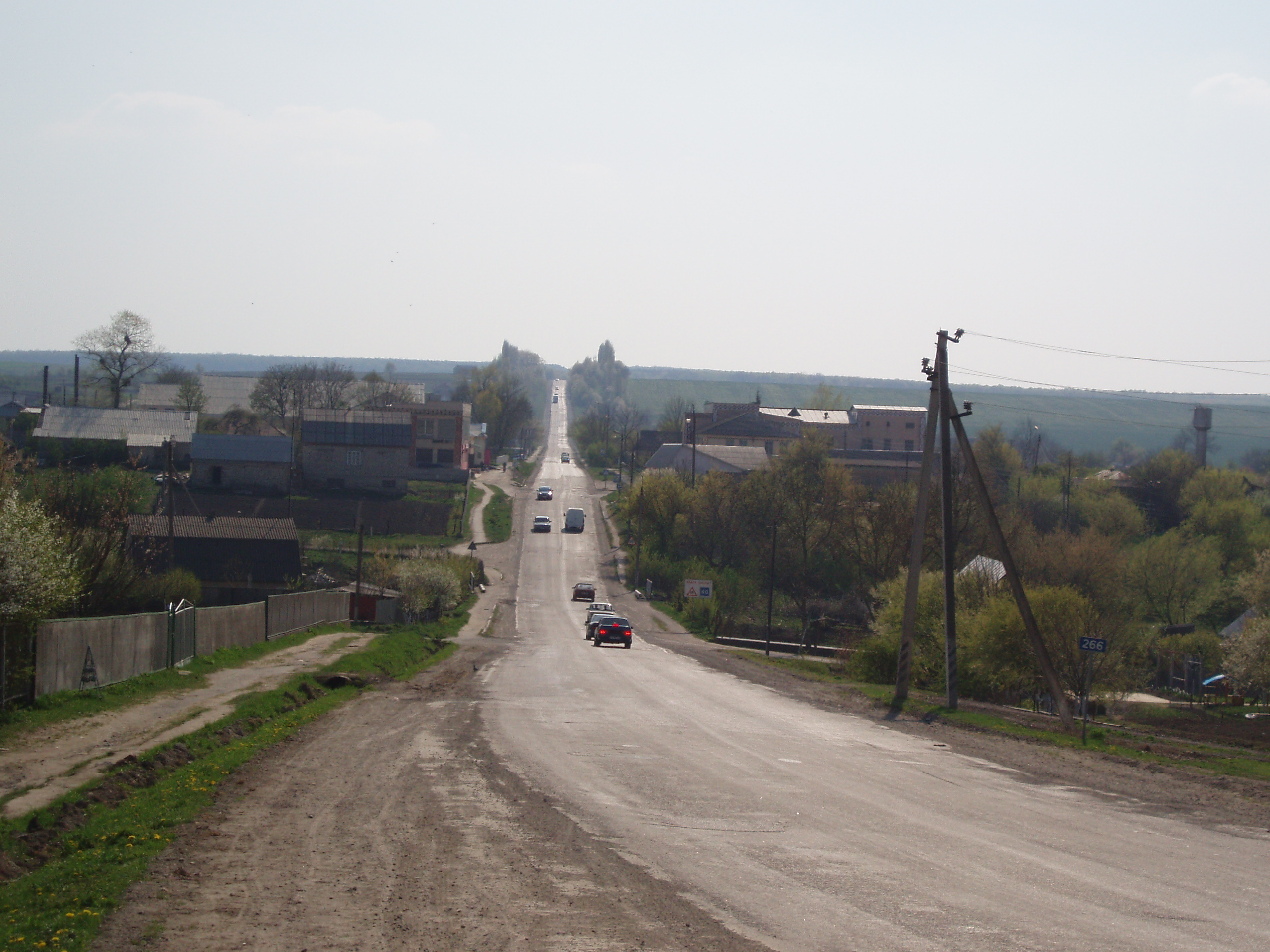 Траса Н03 у містечку Маків на Дунаєвеччині (Хмельницька область), квітень 2009 року